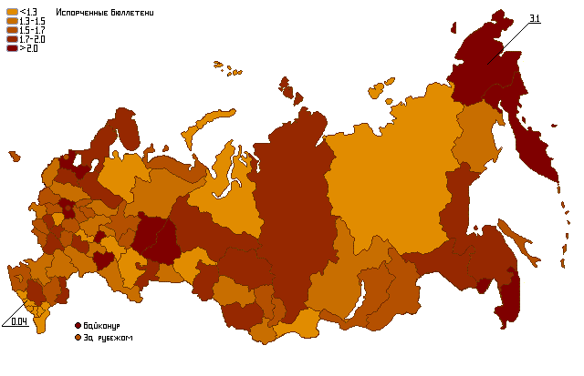 Испорченные бюллетени по регионам на парламентских выборах в России 2011 год.